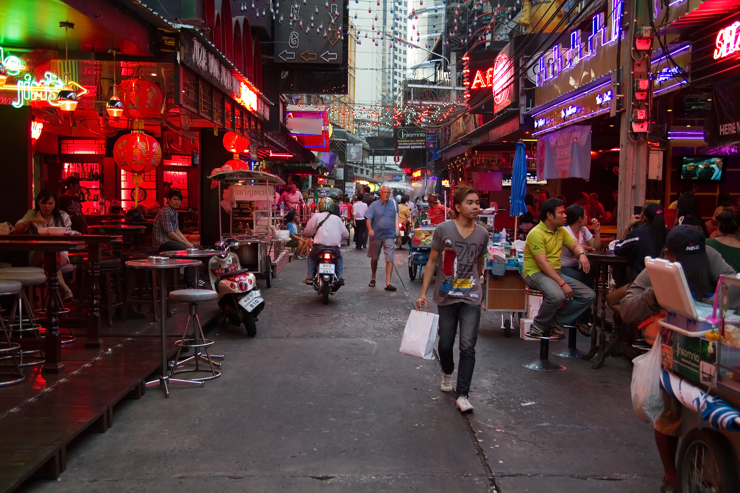 Soi Cowboy, Sukhumvit road, Bangkok, Thailand